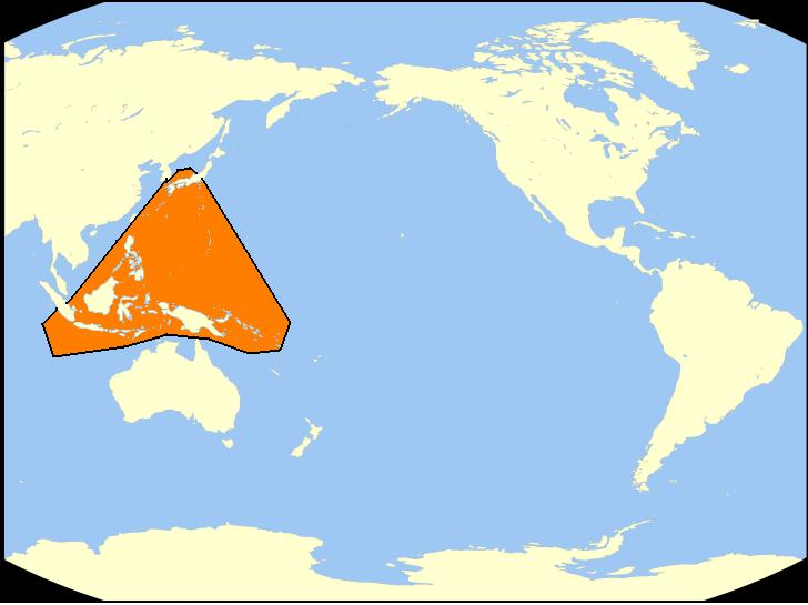 En naranja, la distribución de los rorcuales de Omura, segun